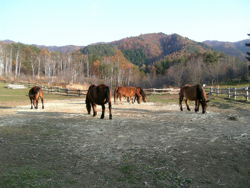 木曽駒 Kiso pony